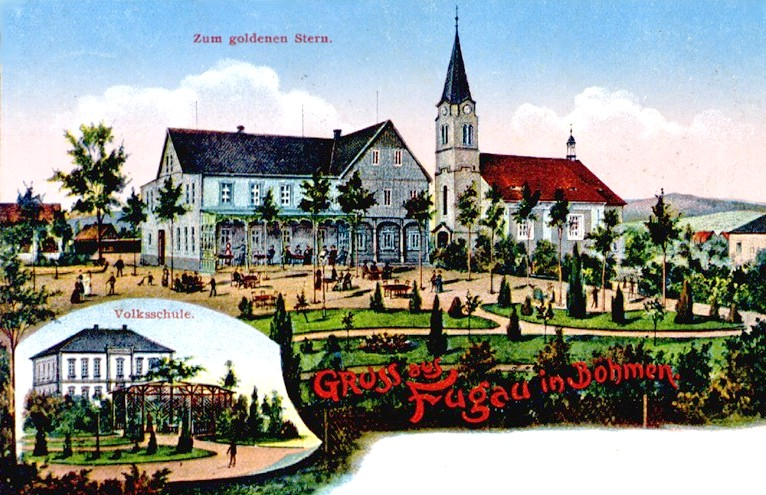 Kostel svatého Václava ve Fukově na dobovém snímku